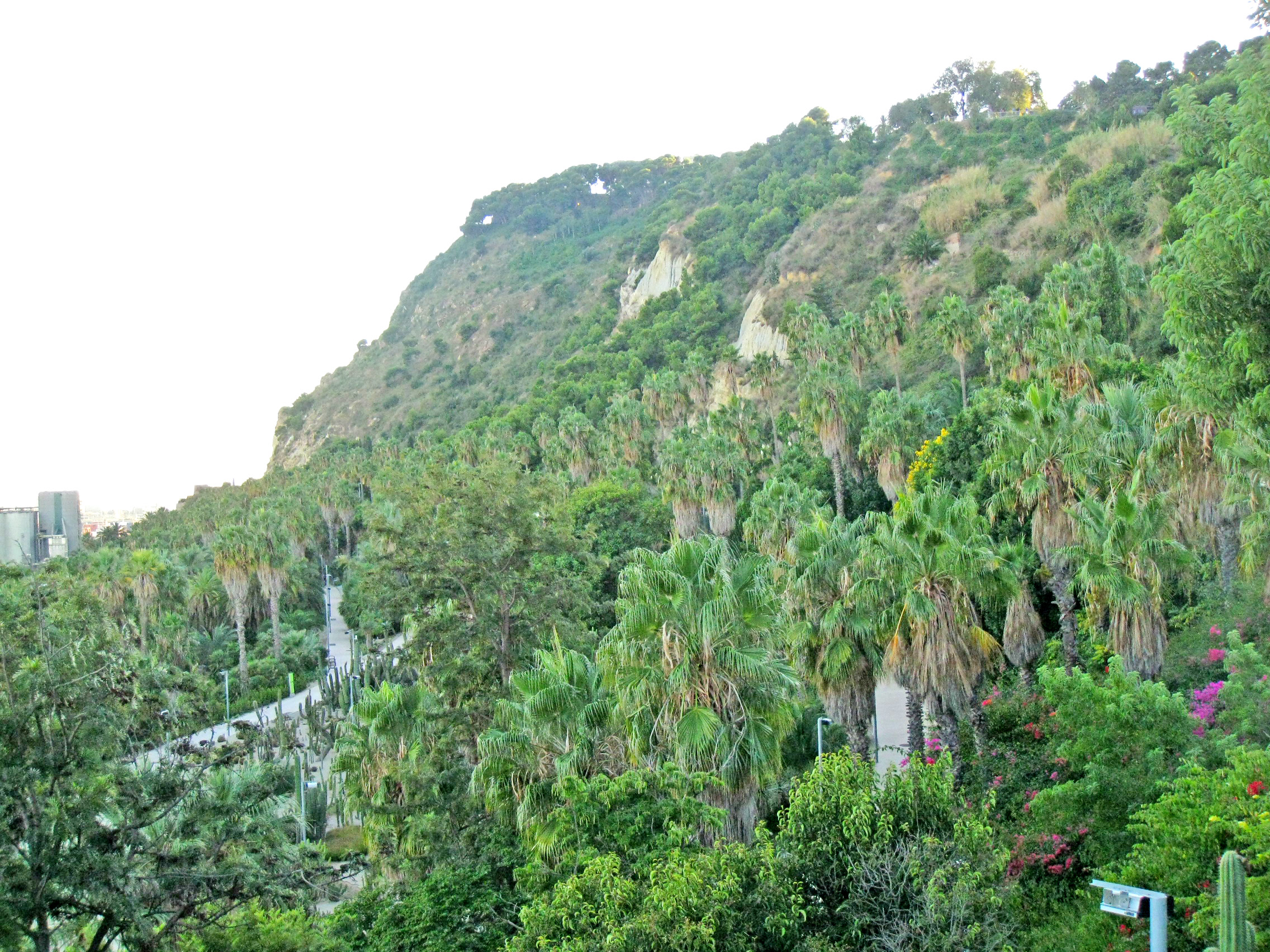 Jardins Mossèn Costa i Llobera, jardí botànic especialitzat en cactus, plantes suculentes i palmeres, al vessant est de Montjuïc, de cara al mar. Vista des dels jardins de Miramar.